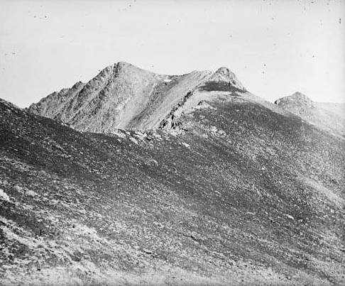 Imatge